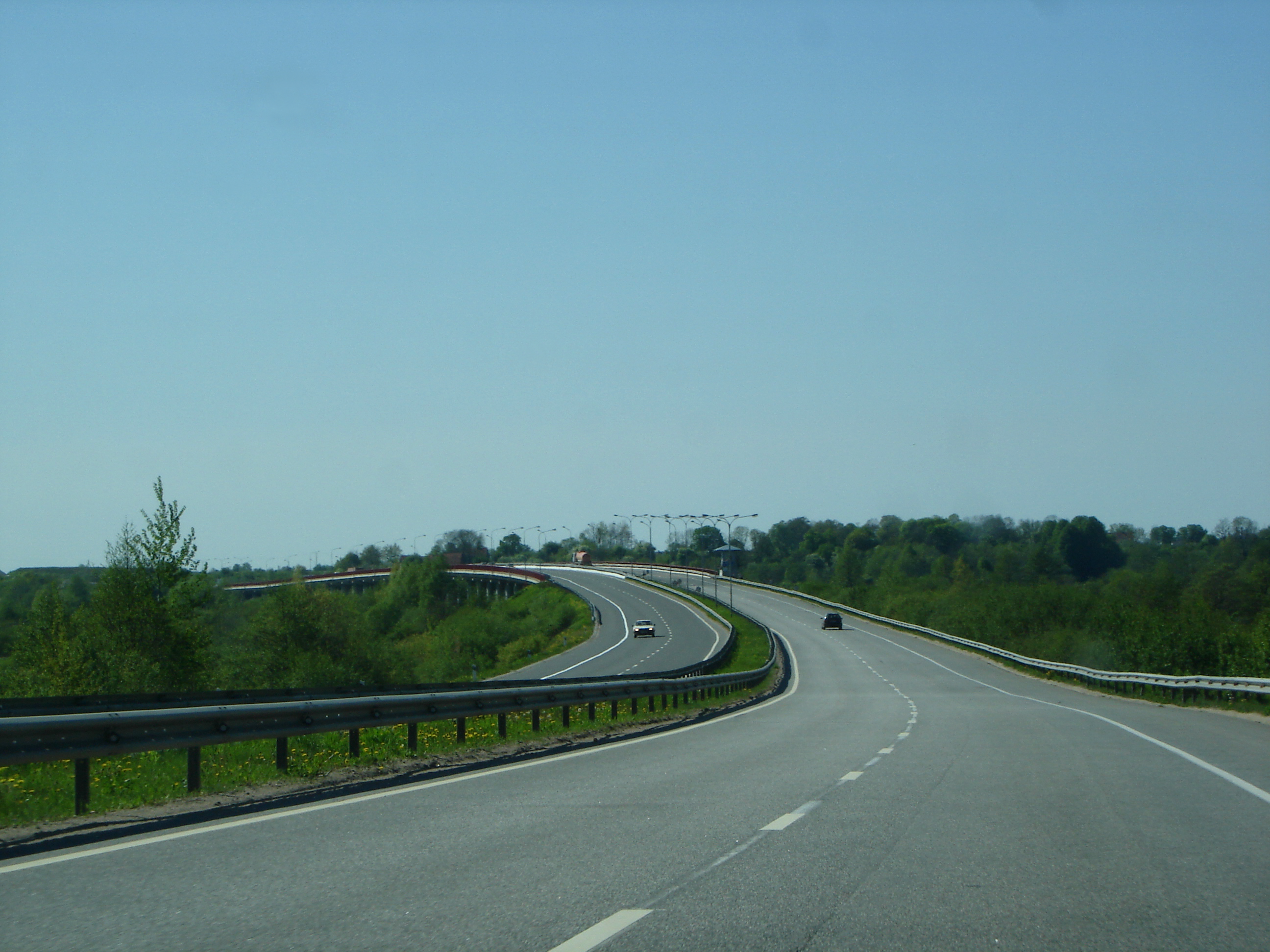 Russische Föderation: Europastraßen 28 und 77 (A229) in der Oblast Kaliningrad